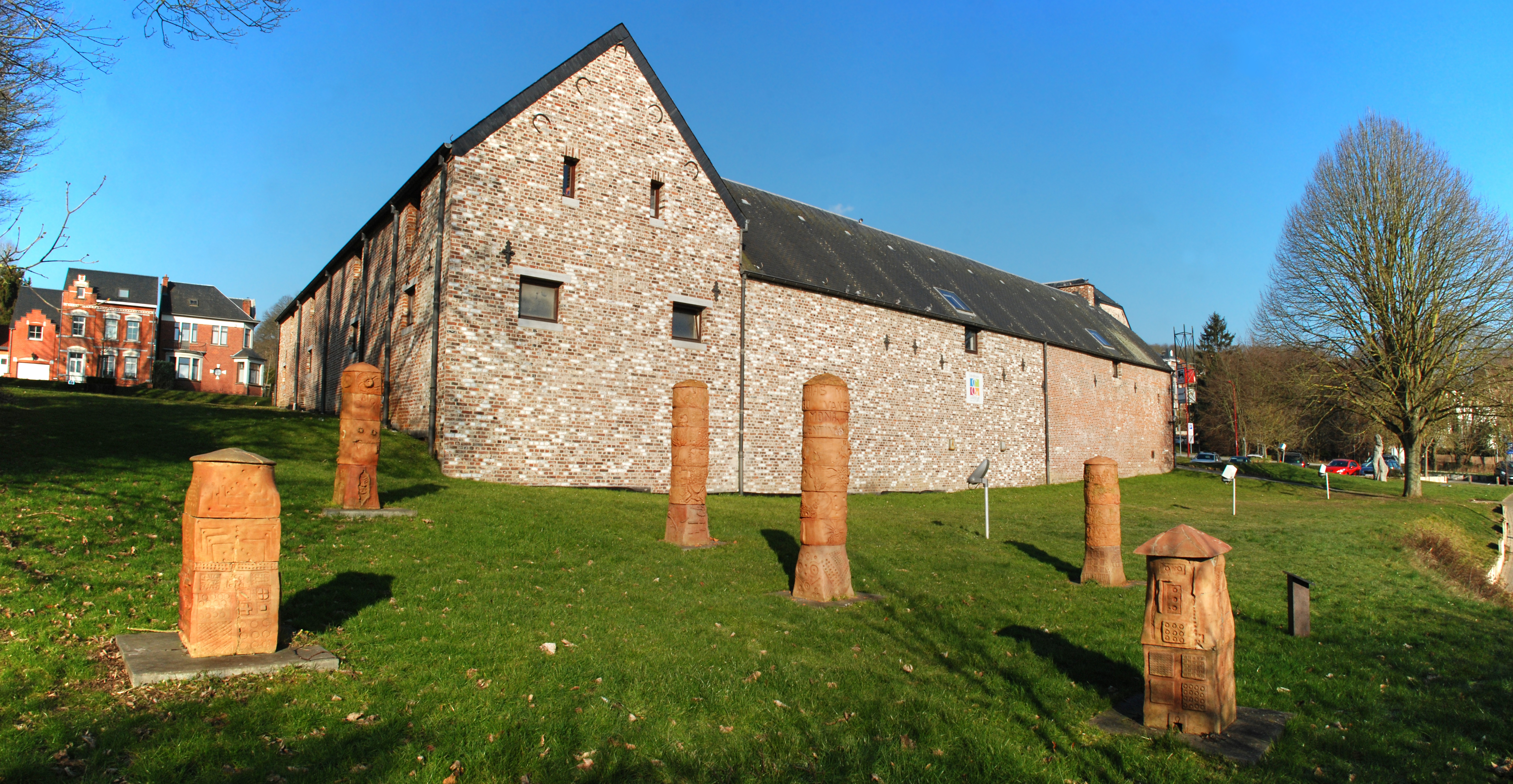 Belgique - Brabant wallon - Ottignies - Ferme du Douaire - Visages Urbains